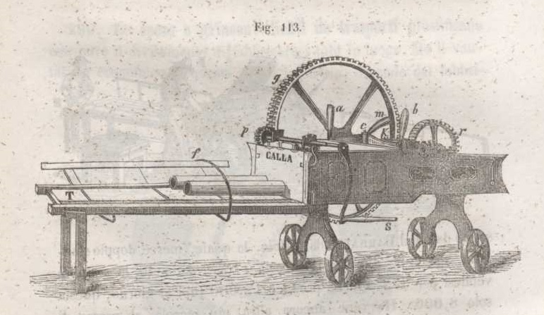 Macchina per la fabbricazione dei doccioni tratto da Manuale del fognatore comprendente la pratica inglese del drenaggio